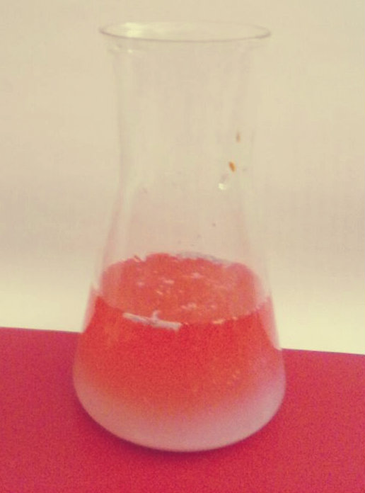 Prikazan crveni kompleks gvožđe(III)-rodanida, koji nastaje tokom taložne titracije, primenom Folhardove metode.